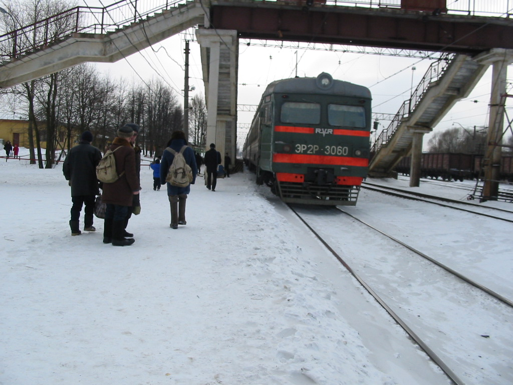 РЖД. Электропоезд ЭР2Р-3060